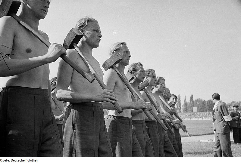 Original image description from the Deutsche FotothekMänner mit geschulterten Hämmern